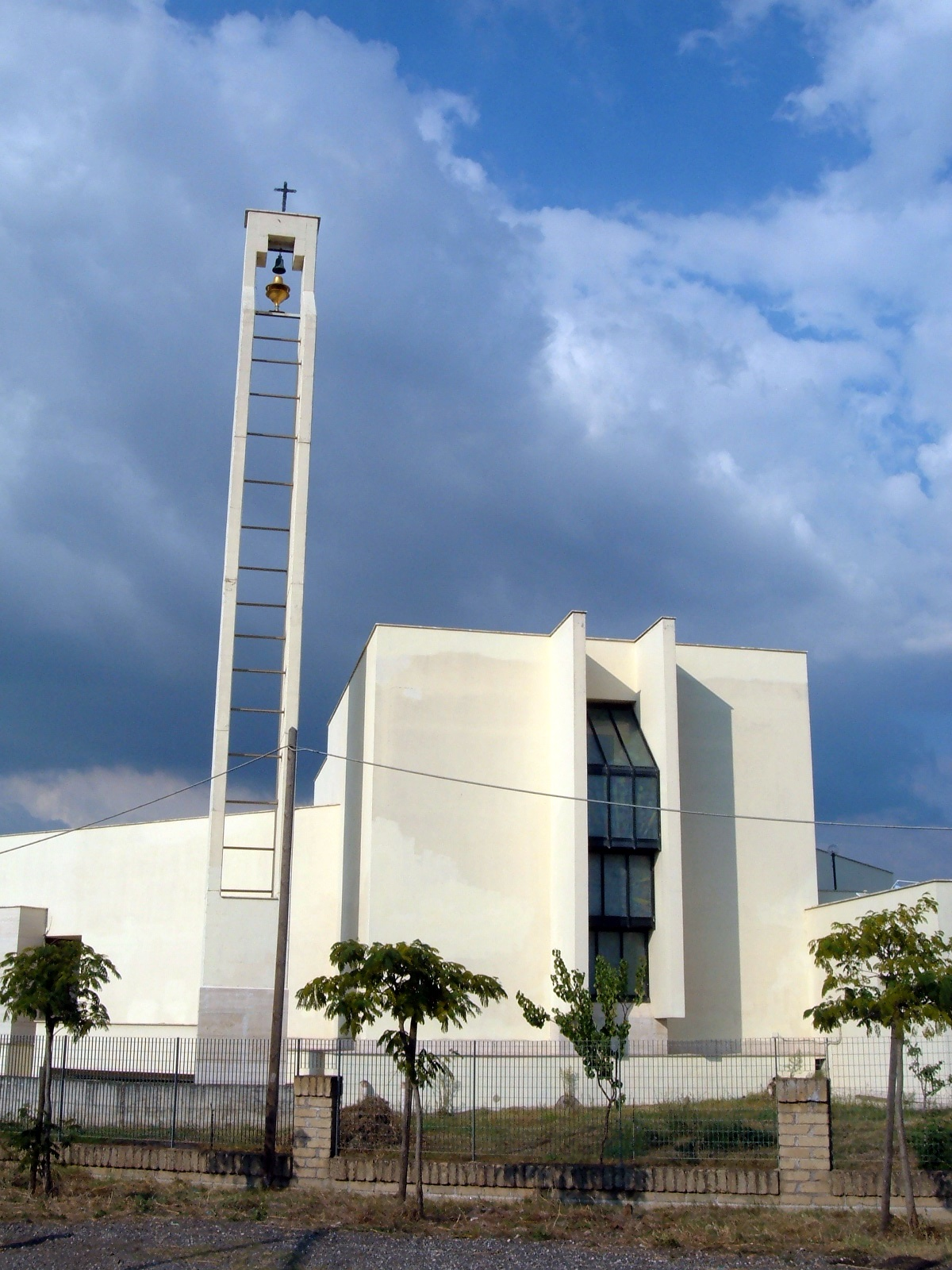 La chiesa di San Michele Arcangelo, a Roma, in via Monteprandone (Giardini di Corcolle, zona San Vittorino).